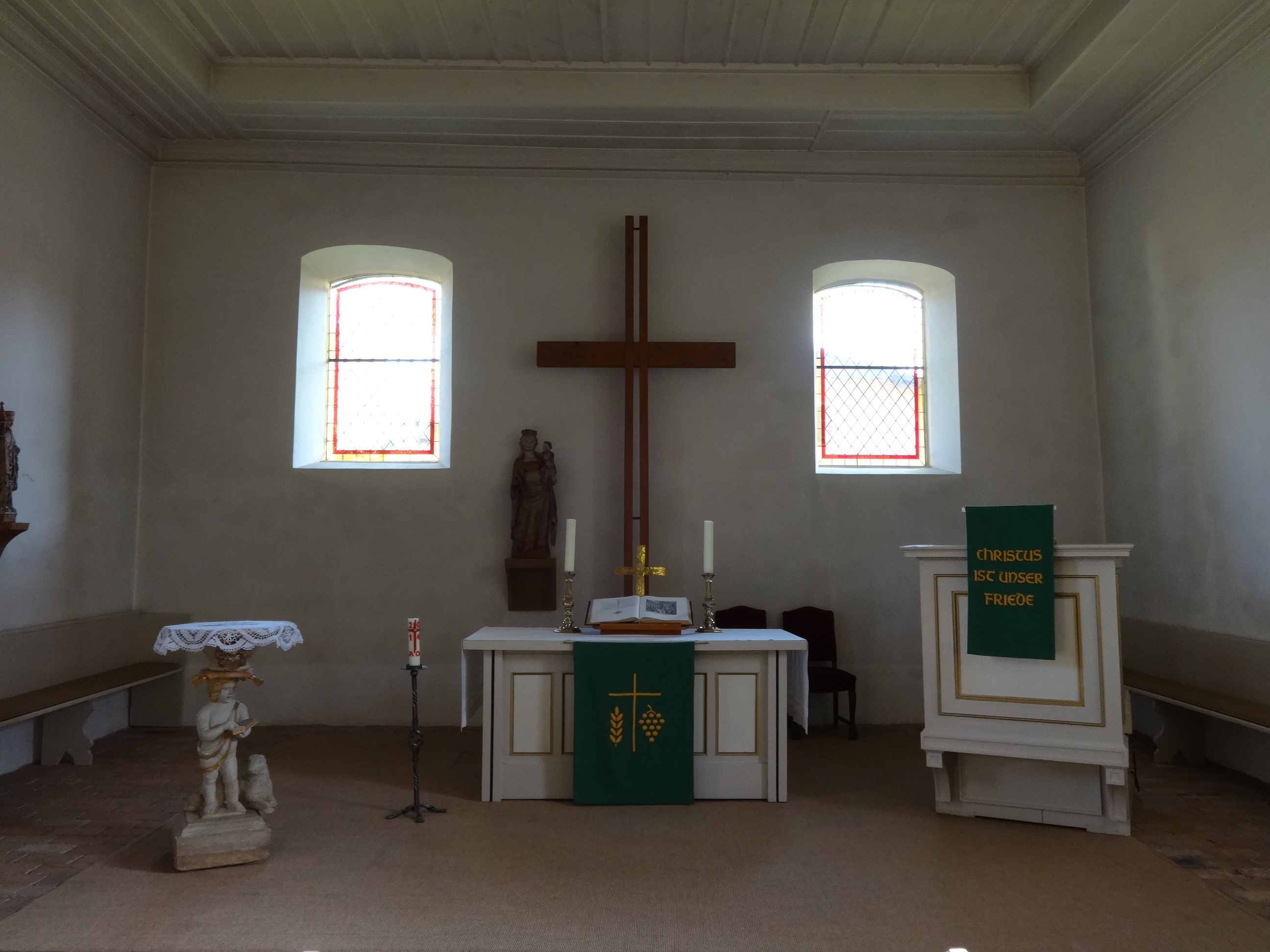 Die evangelische Kirche stammt vermutlich aus dem 14. oder 15. Jahrhundert. Sie ist aus auffällig ungleichmäßigen behauenen Feldsteinen gebaut und damit eine Besonderheit unter den Kirchen im Teltow. Im Innern befindet sich eine gotische Marienfigur aus dem 14. Jahrhundert